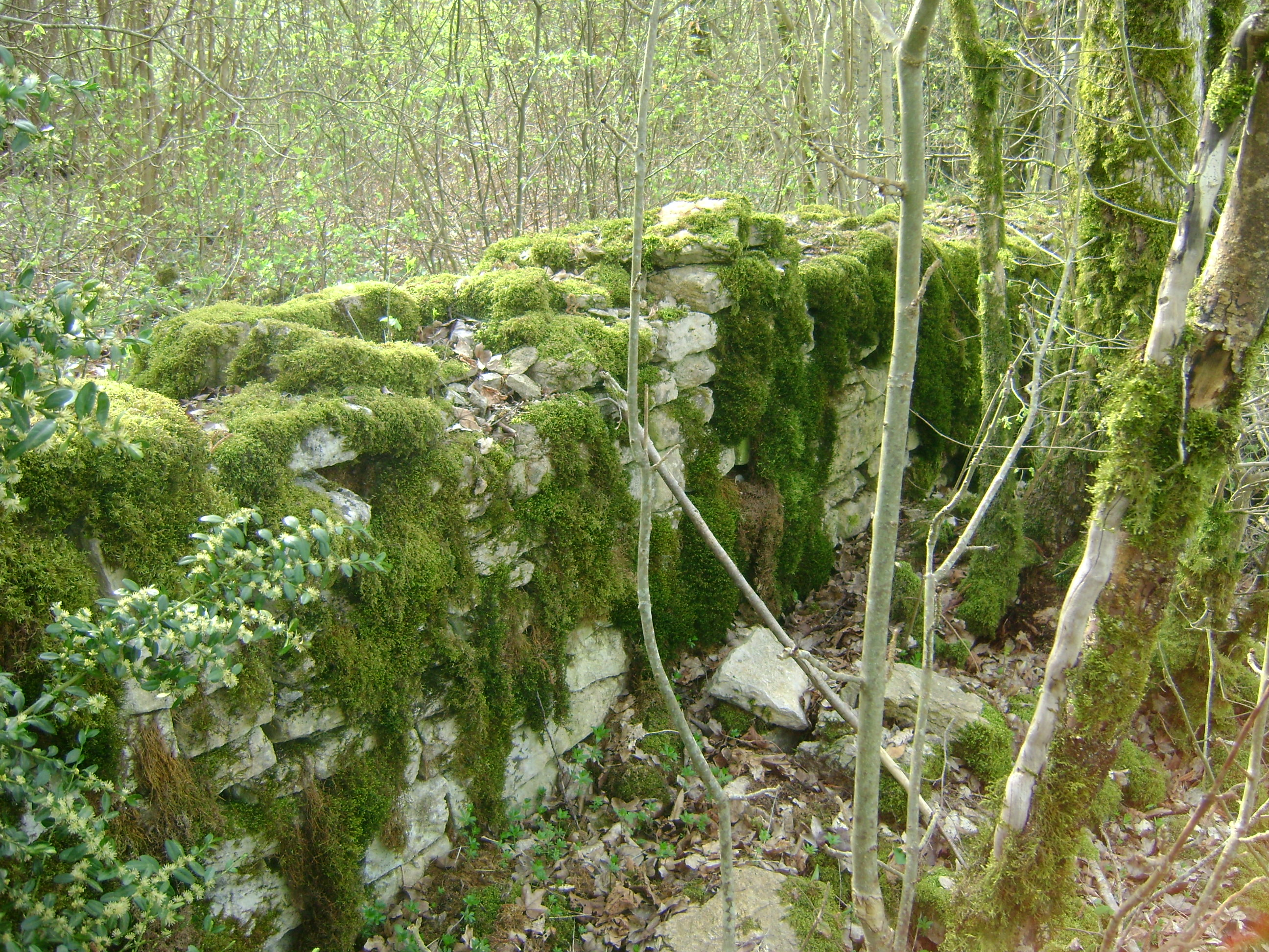 Pan de mur de l'ancien château, Pimorin, Jura, France